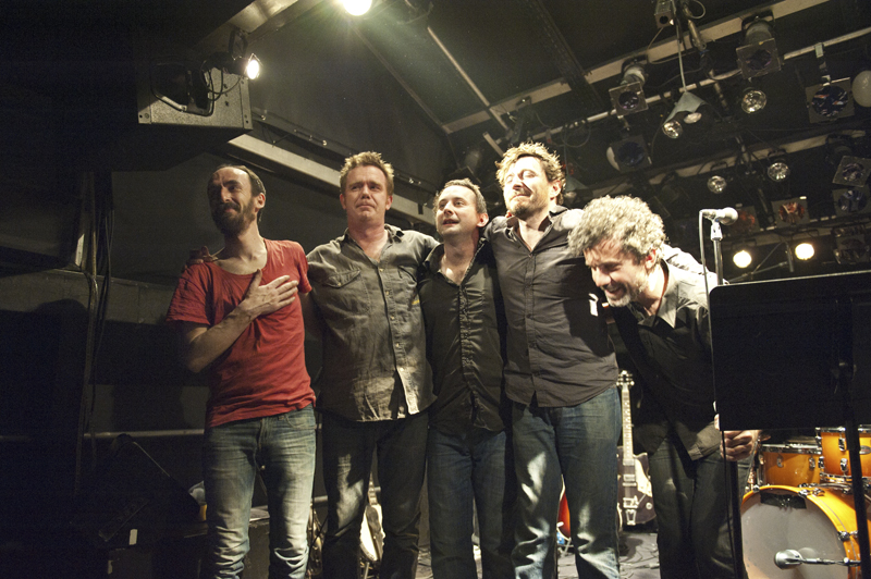 concert à Allonnes